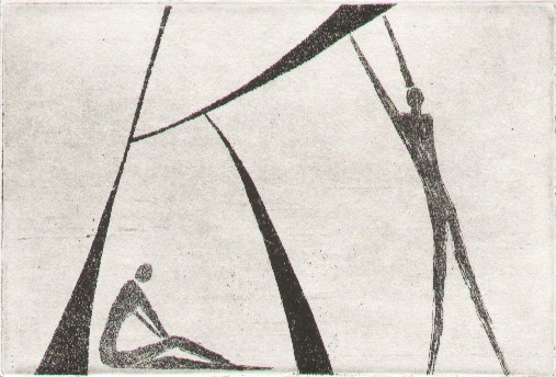 "Franz K."; Radierung zu Kafka: Der Process